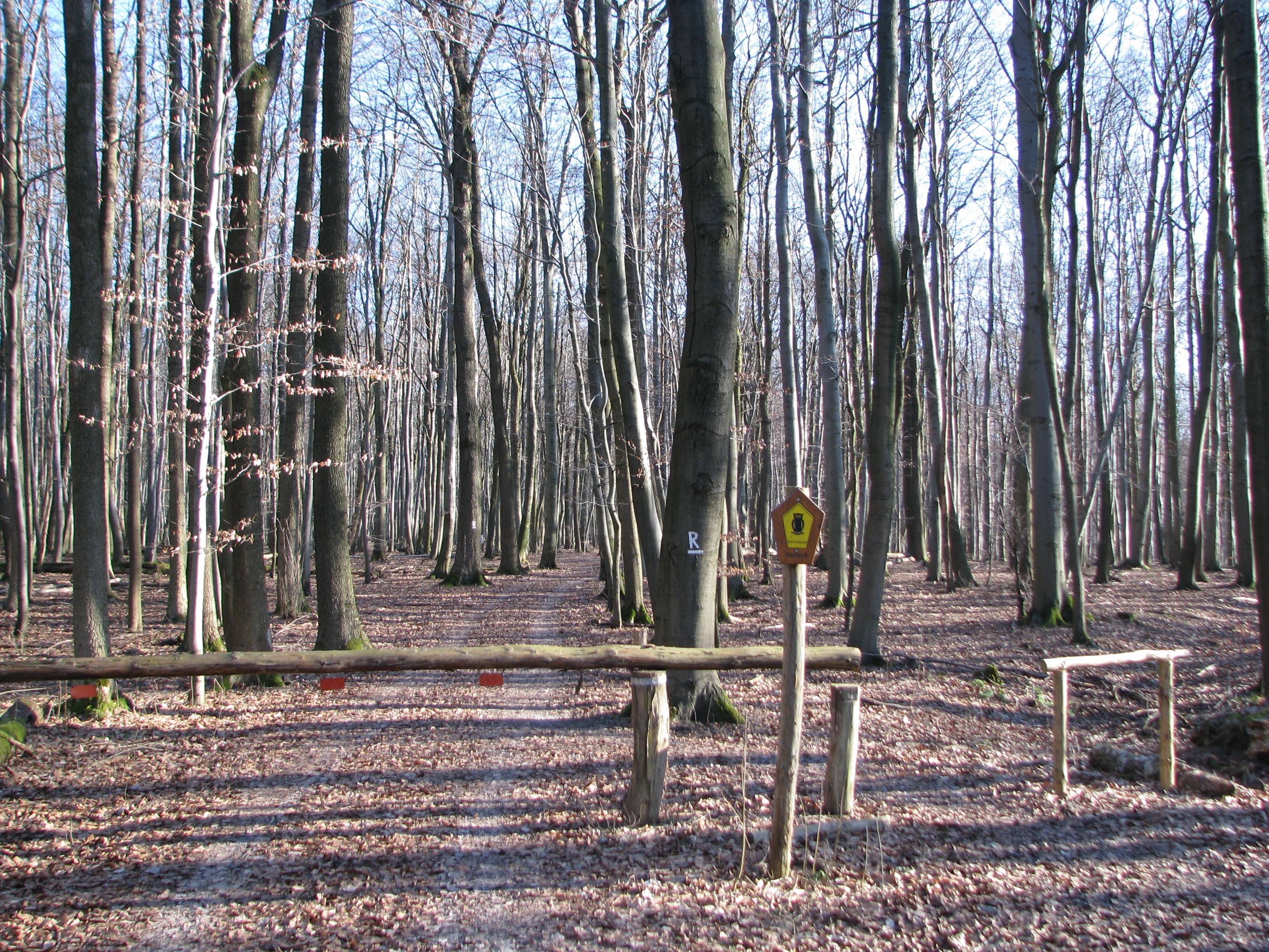 Der Rennstieg an der Grenze zum Nationalpark Hainich.